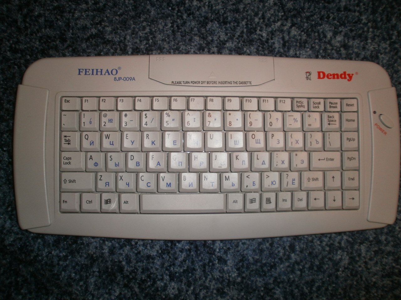 Фаміклон